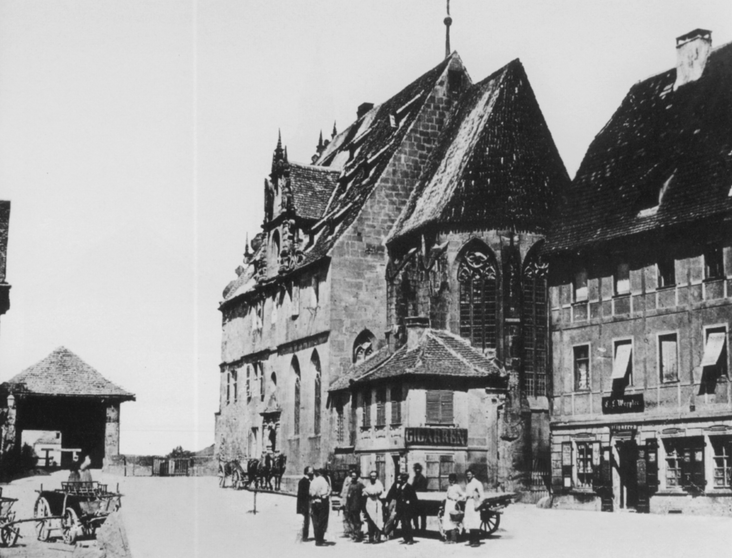 Katharinenspitalkirche in Heilbronn, 1865. Links am Bildrand die hölzerne Neckarbrücke, die weiter nördlich durch die neue Neckarbrücke ersetzt wurde, wofür die Wirtschaftgebäude des Katharinenspitals bereits 1866 abgerissen wurden. Die Kirche selbst wurde 1871 abgerissen.